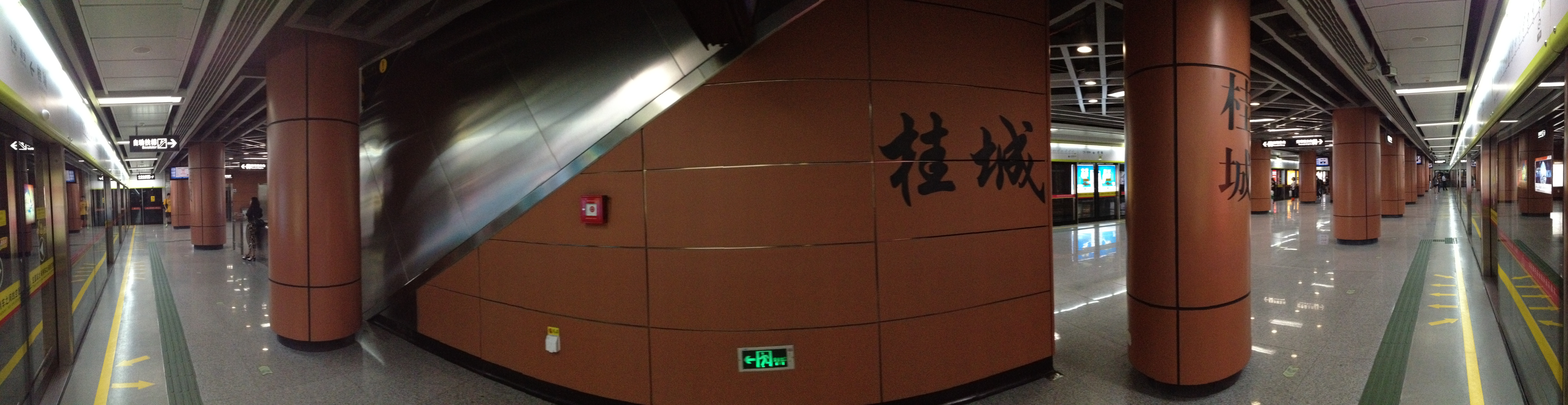 广佛地铁桂城站月台全景图